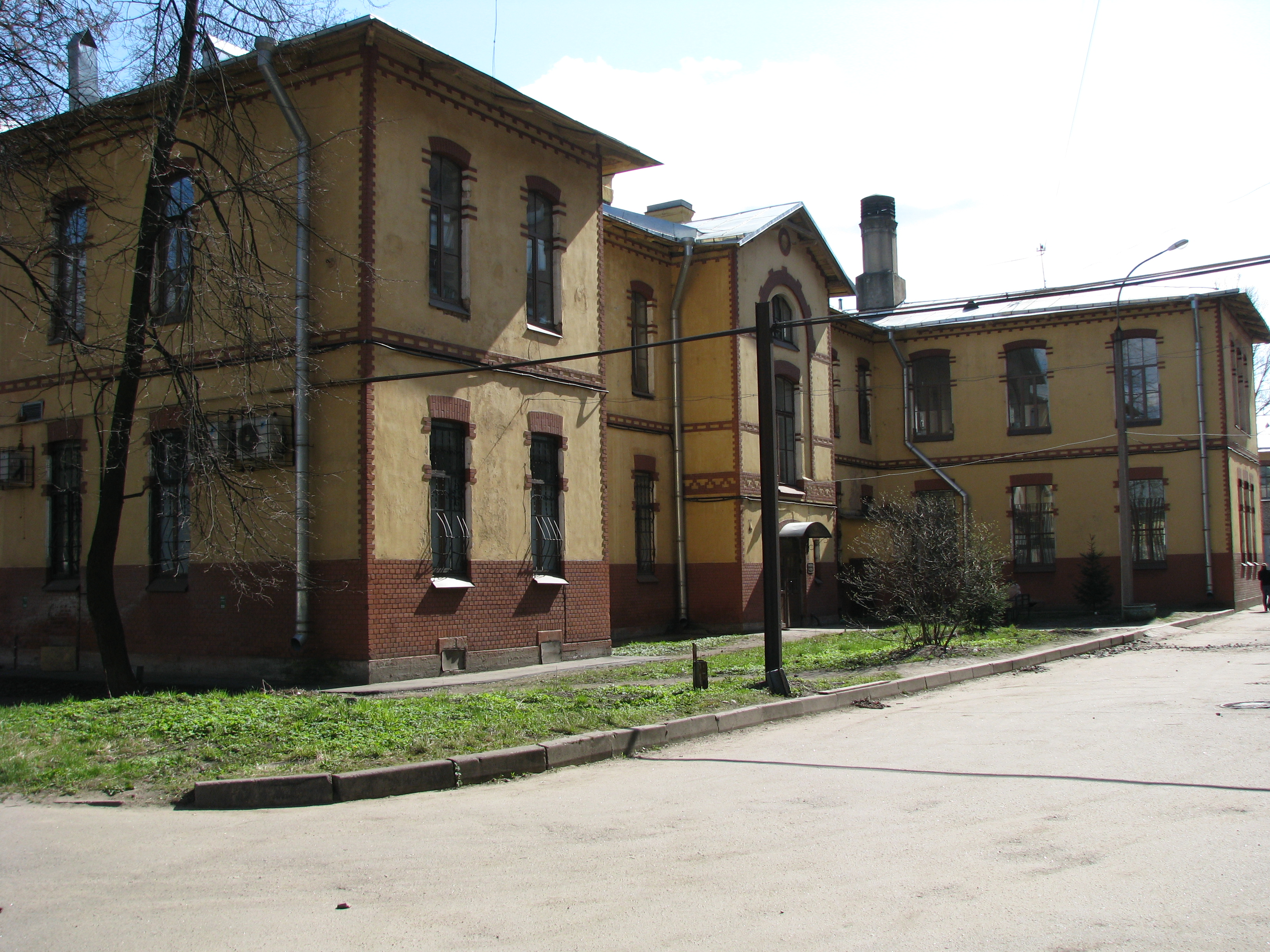 Один из корпусов Академии